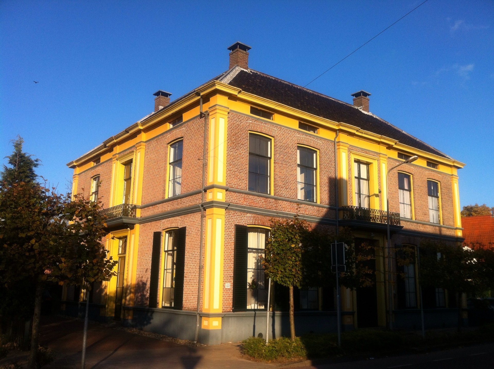 Herenhuis met verdieping en schilddak met hoekschoorstenen, voor levi salomon sp Borne